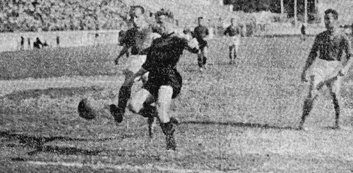 Roma, 8 giugno 1941, Roma-Venezia (3-3). Valentino Mazzola, inseguito da Brunella, sta per calciare in porta e segnerà il primo gol dei veneziani.